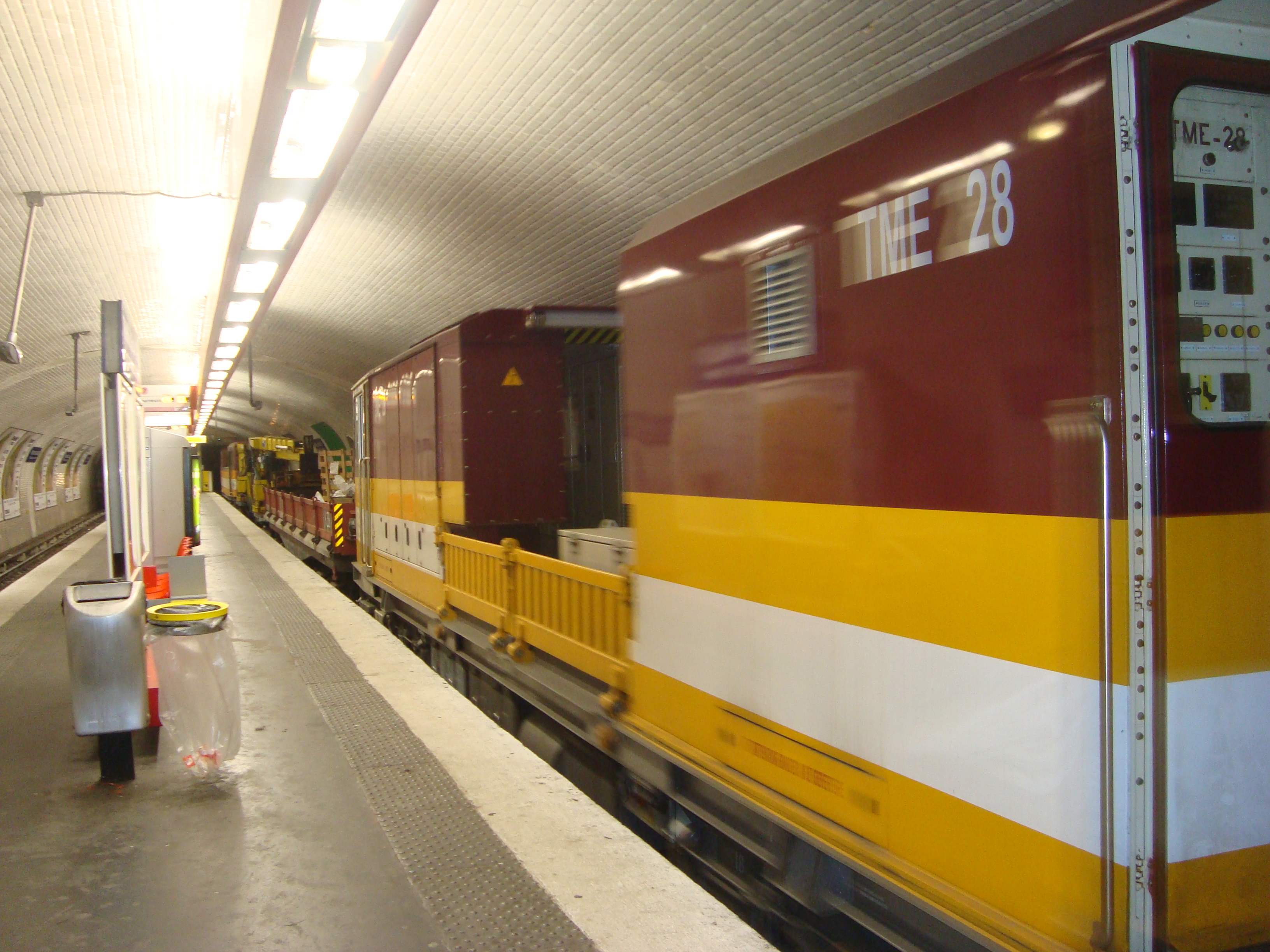 Le TME 28 passe en station de La Villette.